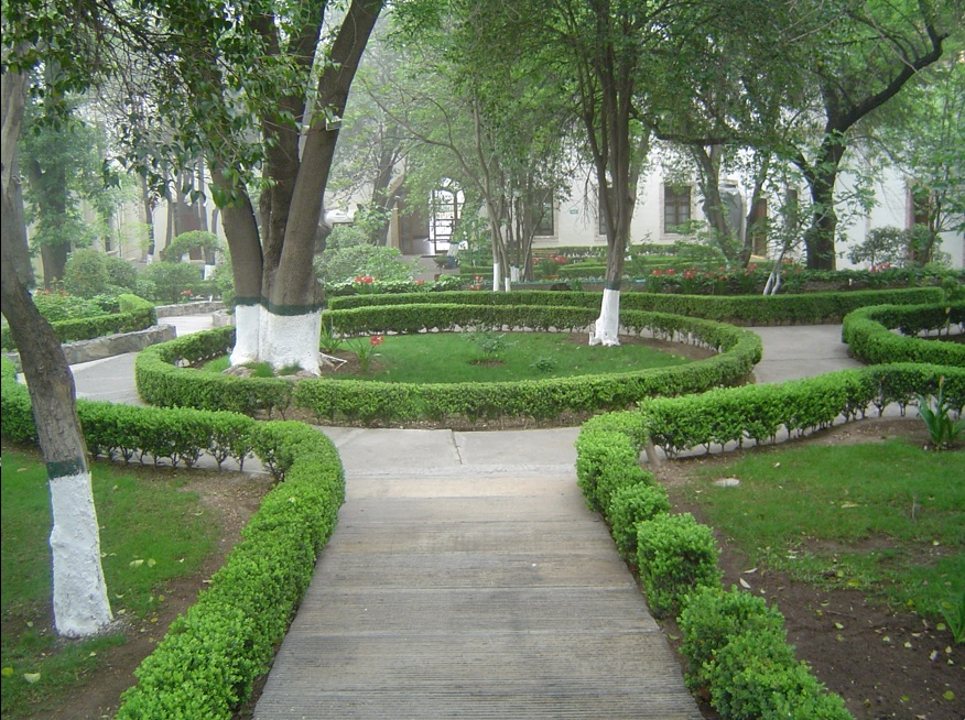 Jardín del Museo de las Aves de México. Este recinto cuenta un hermosos jardín digno de admirar.